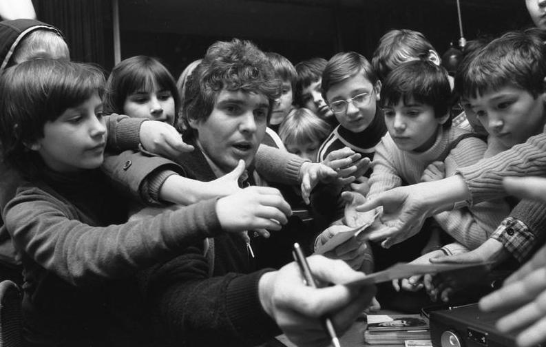 ADN-ZB / Reiche / 15.1.80 / Berlin: Der beliebte Schlagerinterpret Frank Schöbel besuchte die Kinderbibliothek Berthold Brecht in der Karl-Marx-Allee. Zur Autogrammstunde war er von den Kindern dicht umlagert.